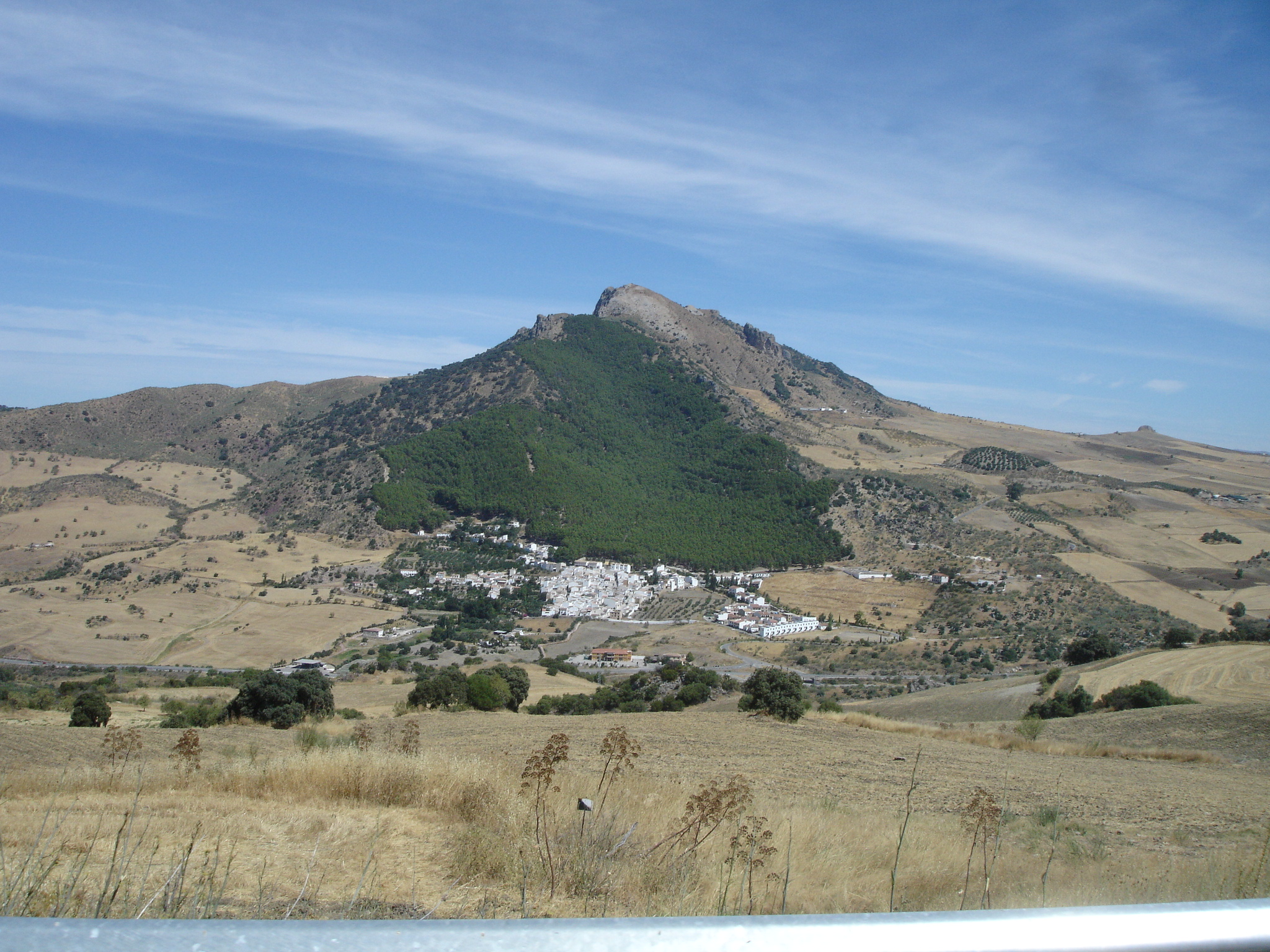 Montecorto (SPAIN)